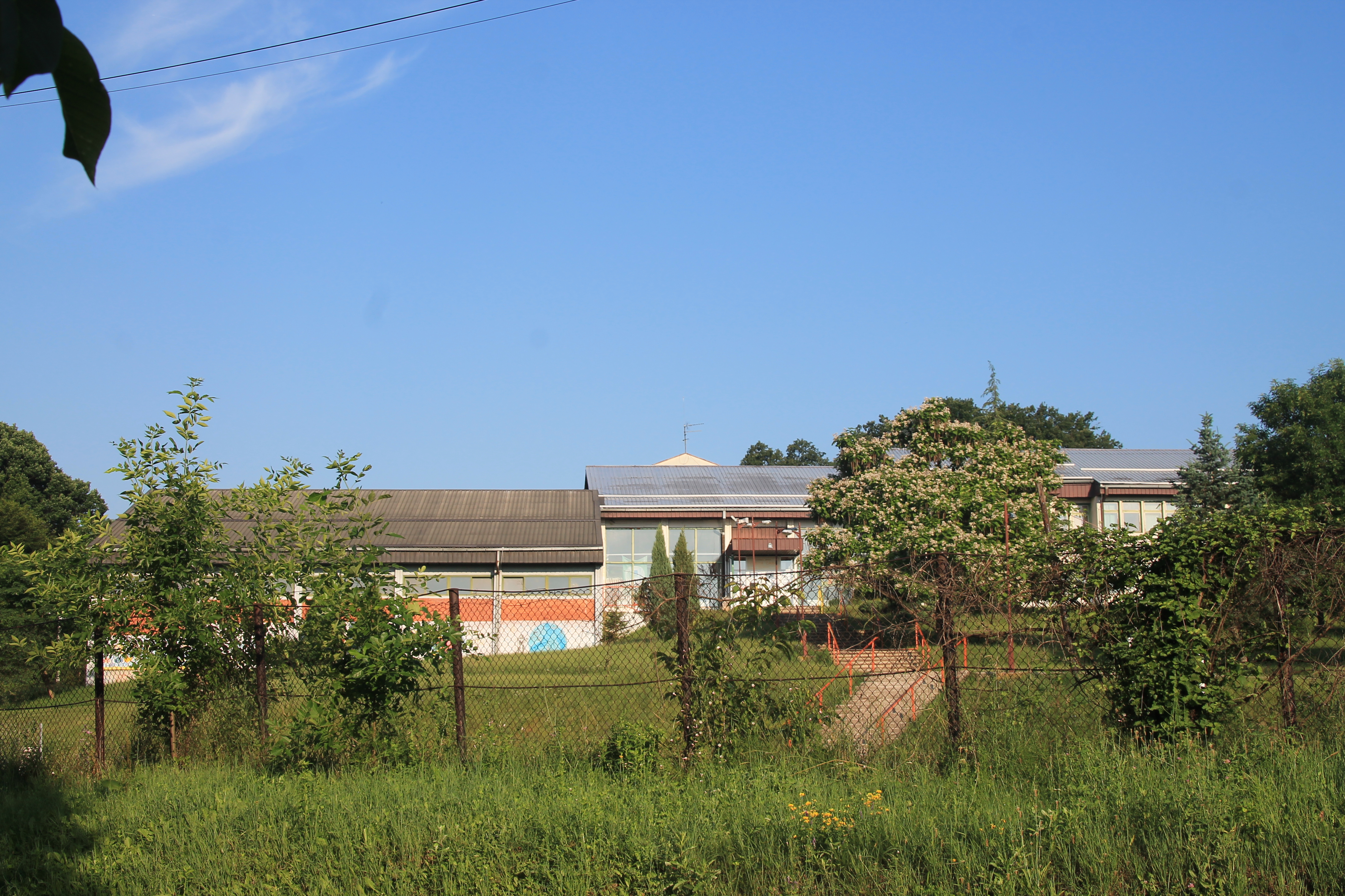 Gornji Milanovac